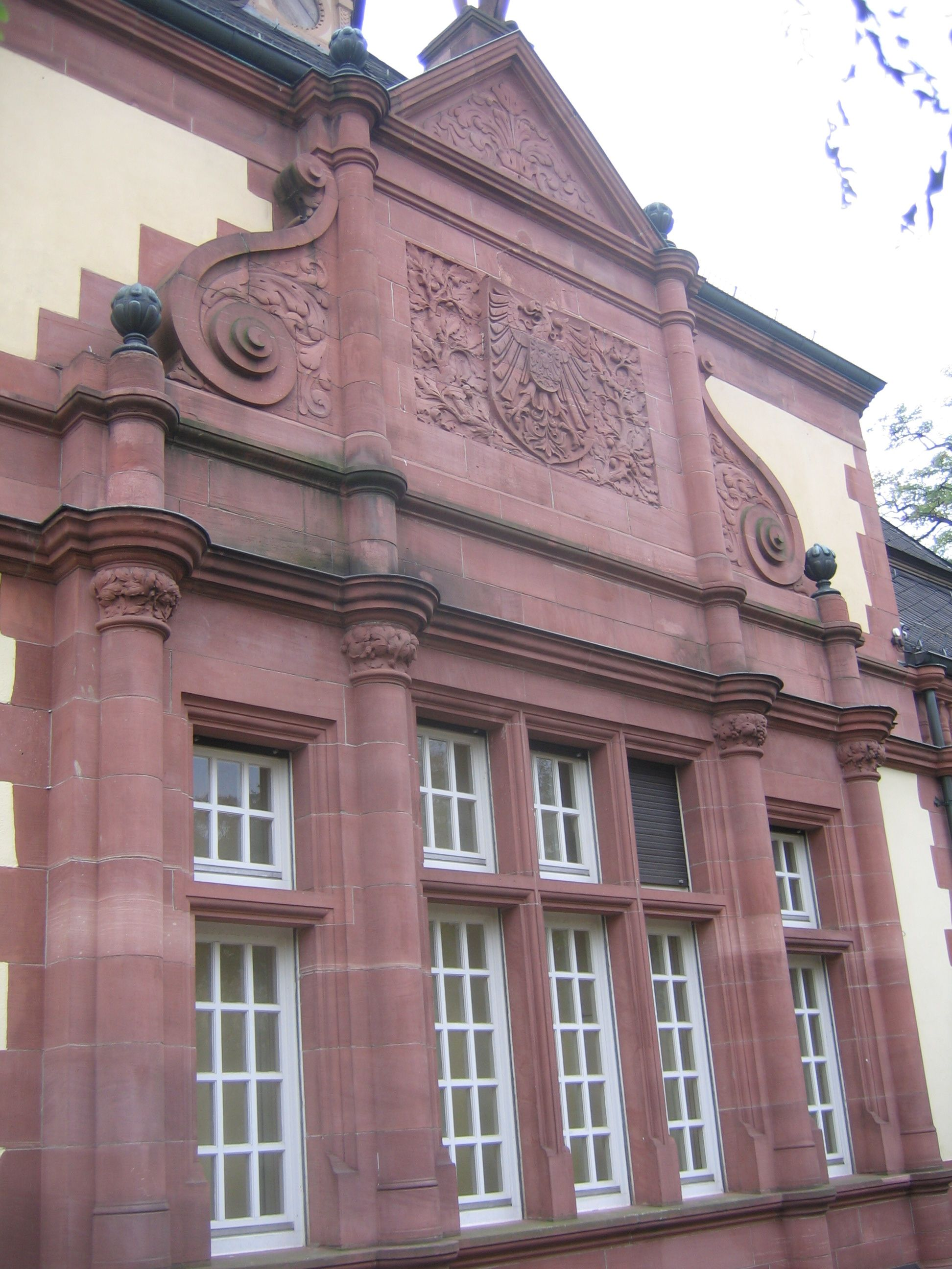 Empfangsgebäude Kaiser Wilhelms II. in Bad Homburg